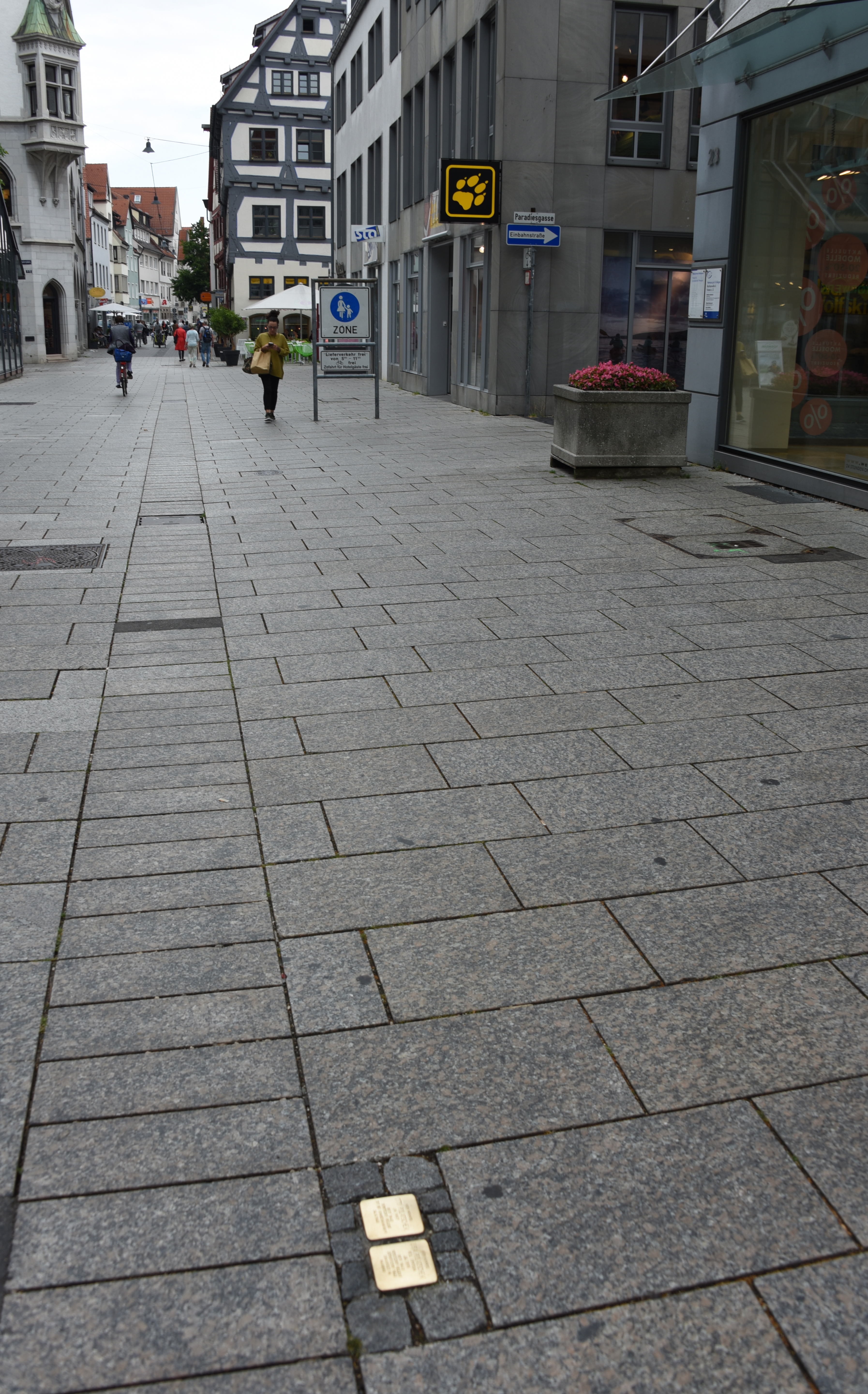 Stolpersteine in Ulm